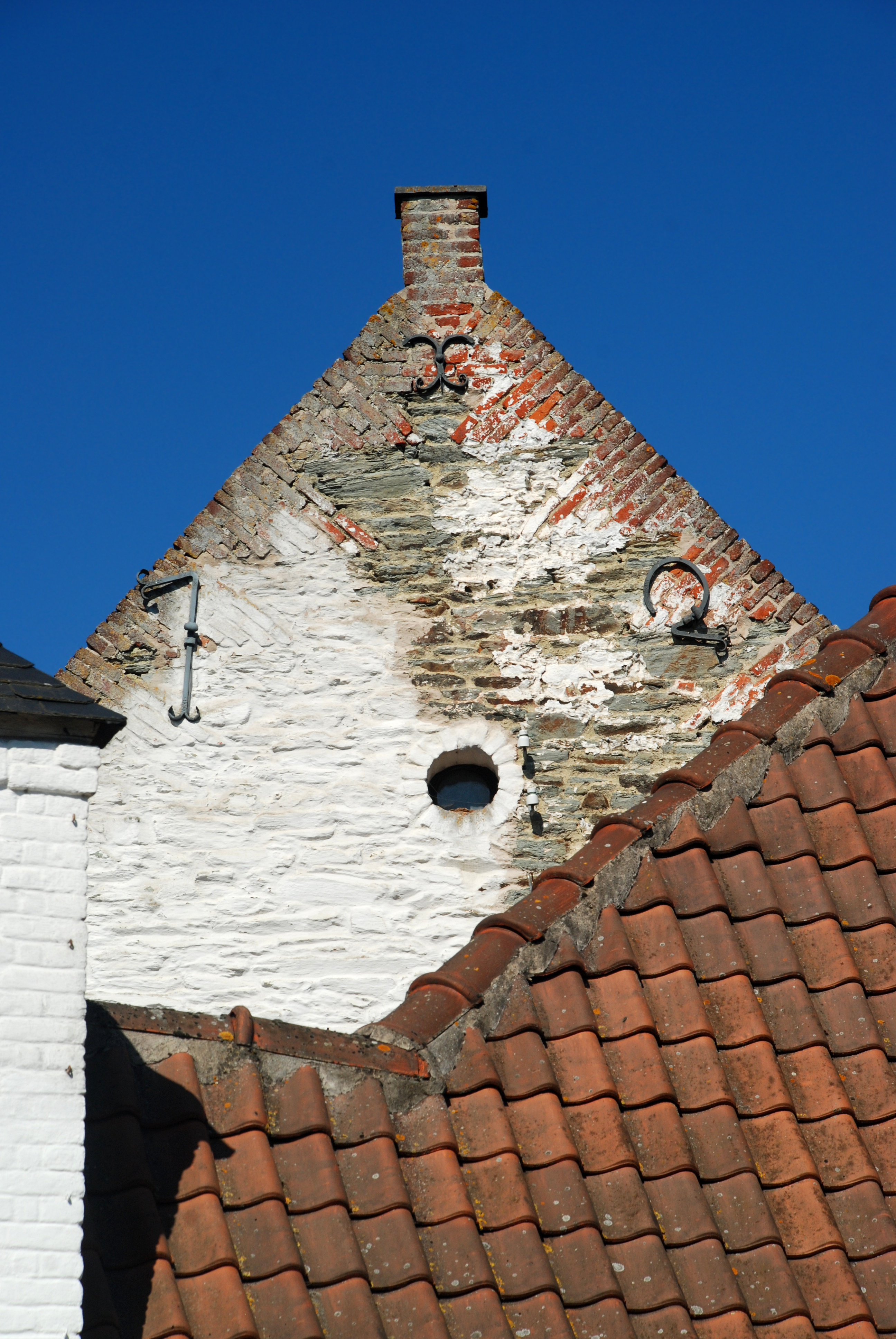 Belgique - Brabant wallon - Court-Saint-Étienne - Ferme de Beaurieux